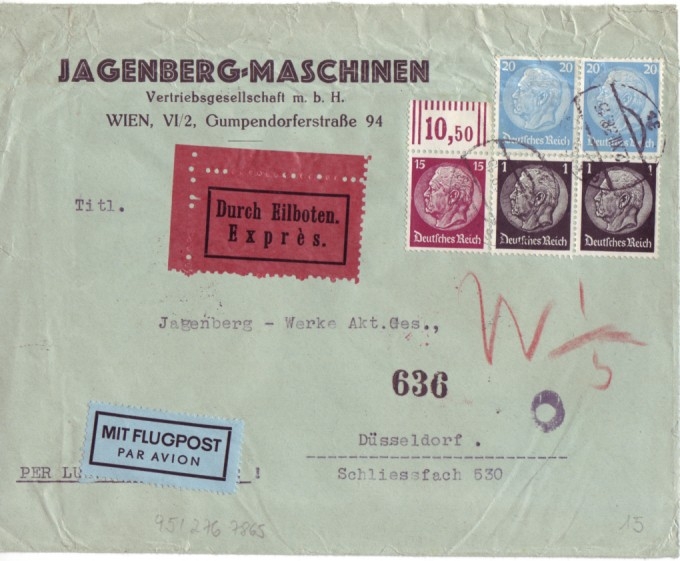 Rohrpost Wien Fern-Eilboten-Lp-Brief von Wien nach_Düsseldorf _1938.jpg nach Düsseldorf, dort Merkmale einer Rohrpostbeförderung